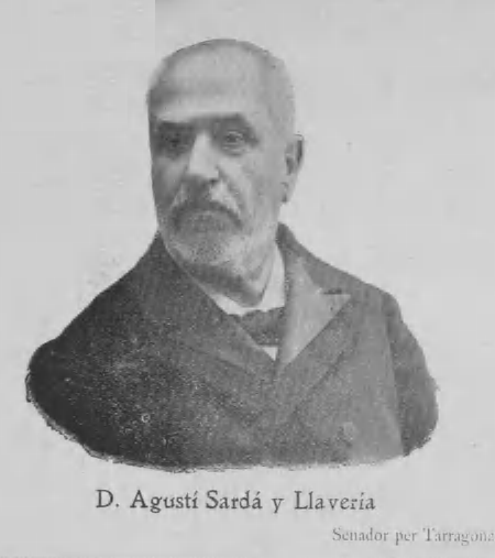 Agustín Sardá y Llavería, senador por Tarragona, fotografía aparecida en "Solidaritat Catalana (Recort de las festas del homenatge)", Barcelona, 20 de mayo de 1906